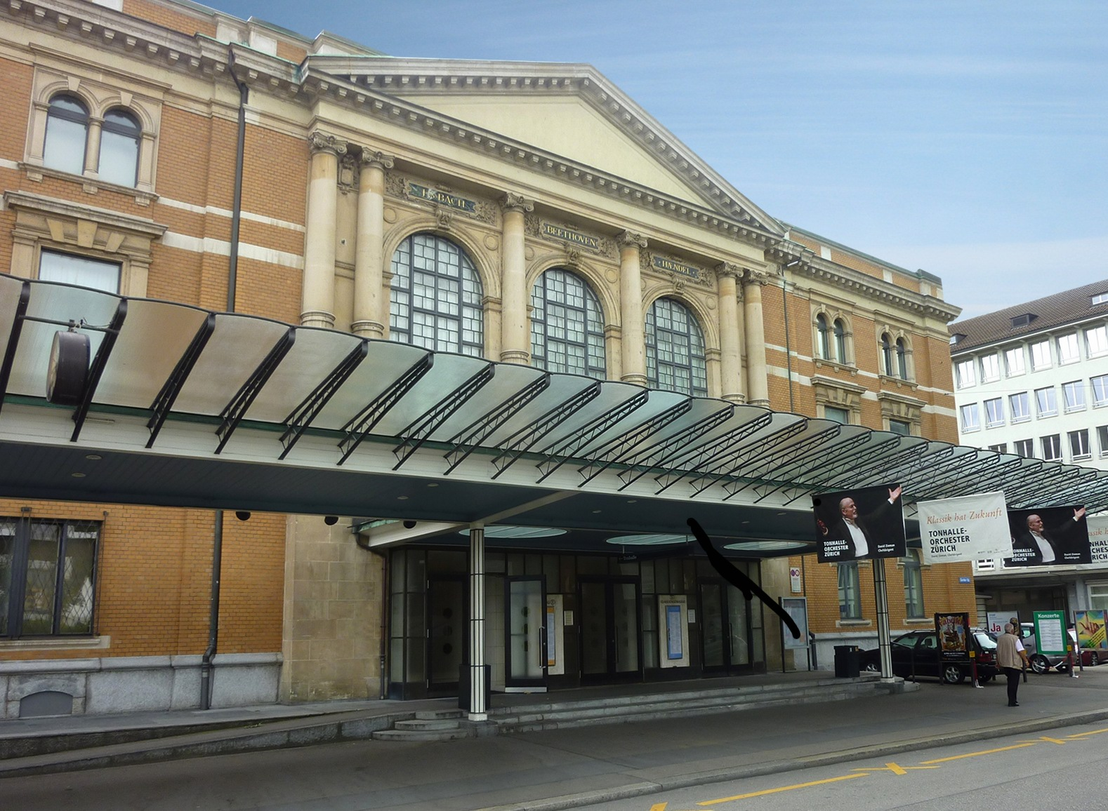 Tonhalle Zürich, Eingangsbereich